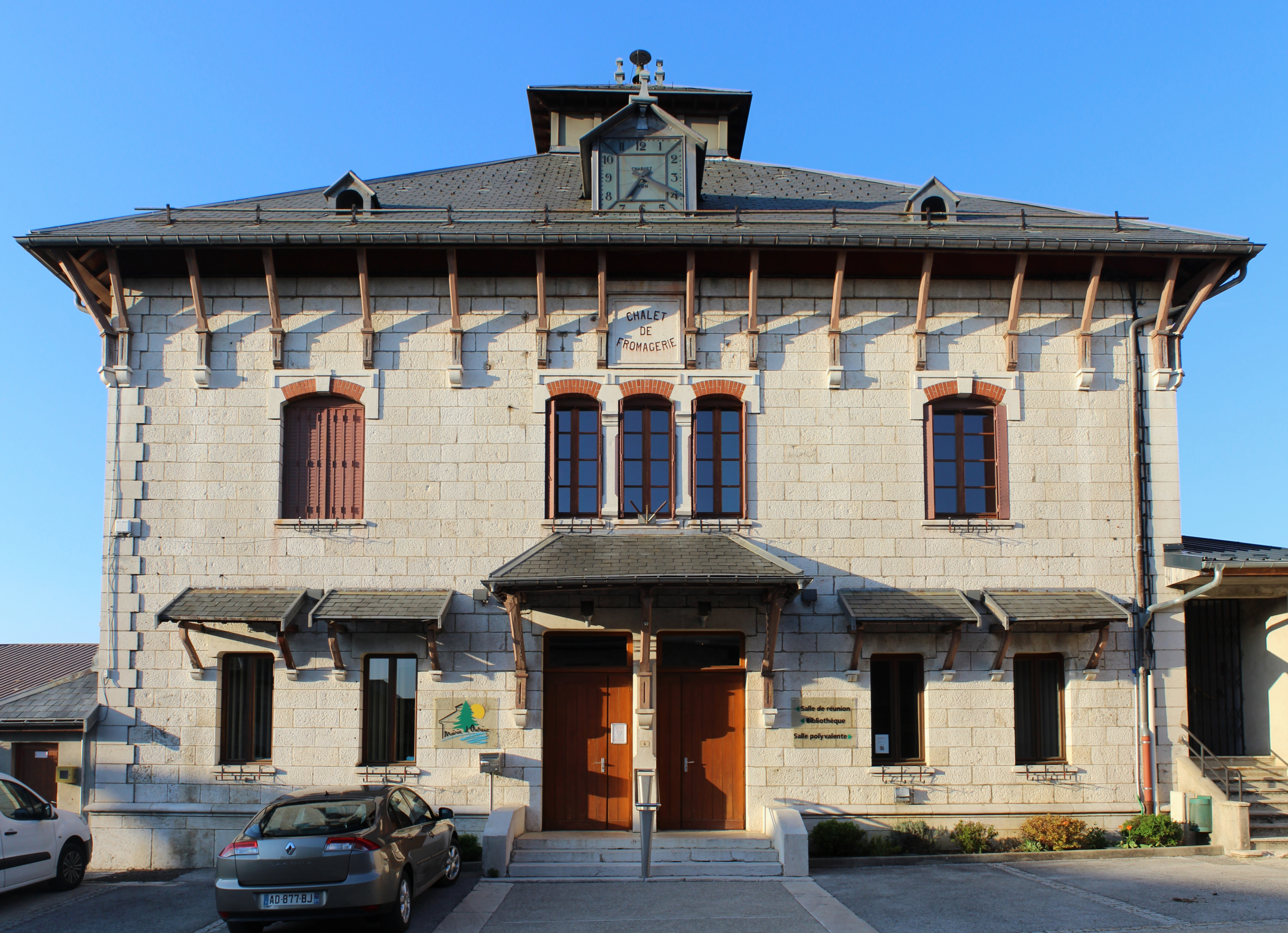 Mairie d'Outriaz.